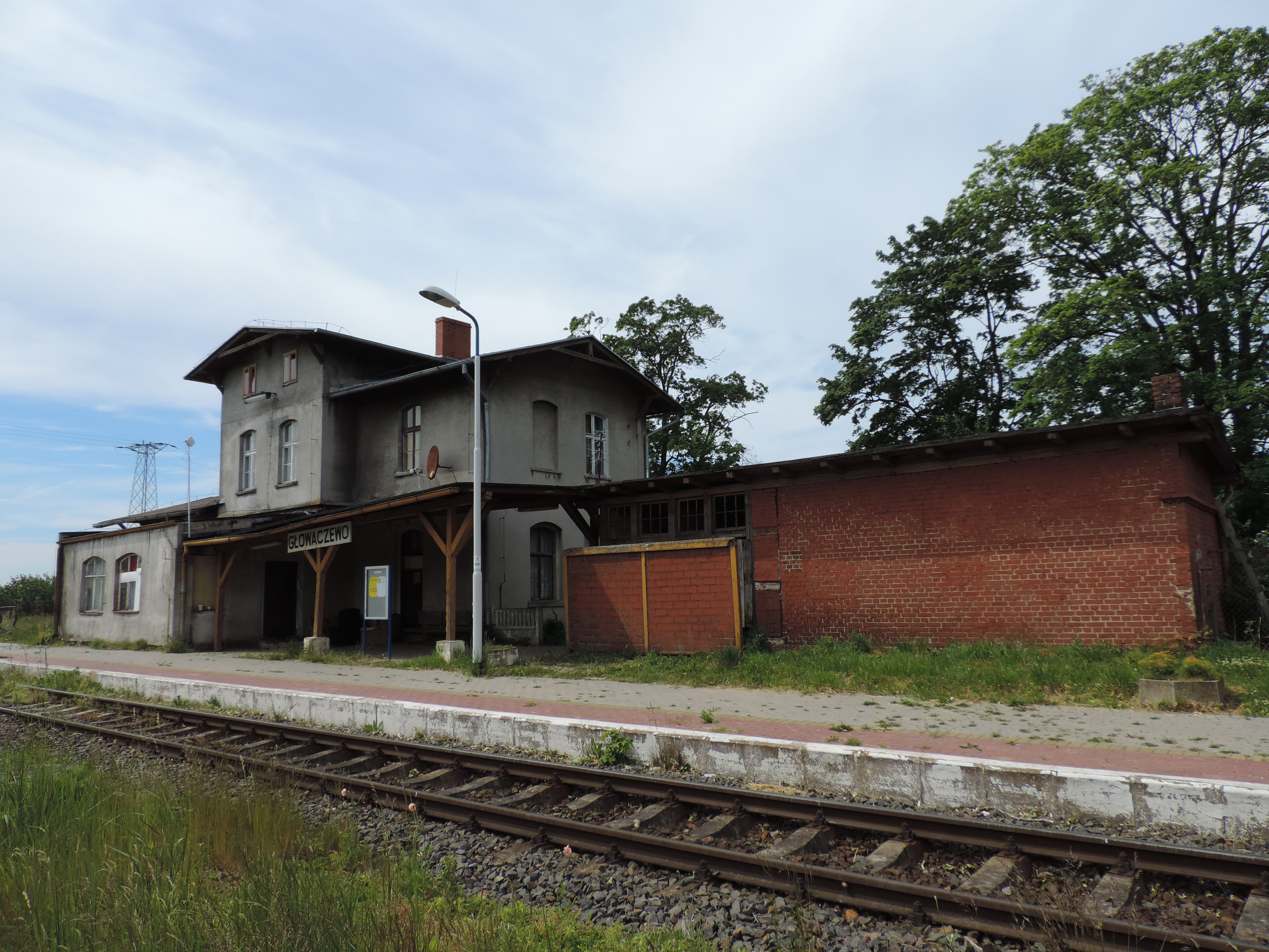 Stacja kolejowa w Głowaczewie, gm. Kołobrzeg